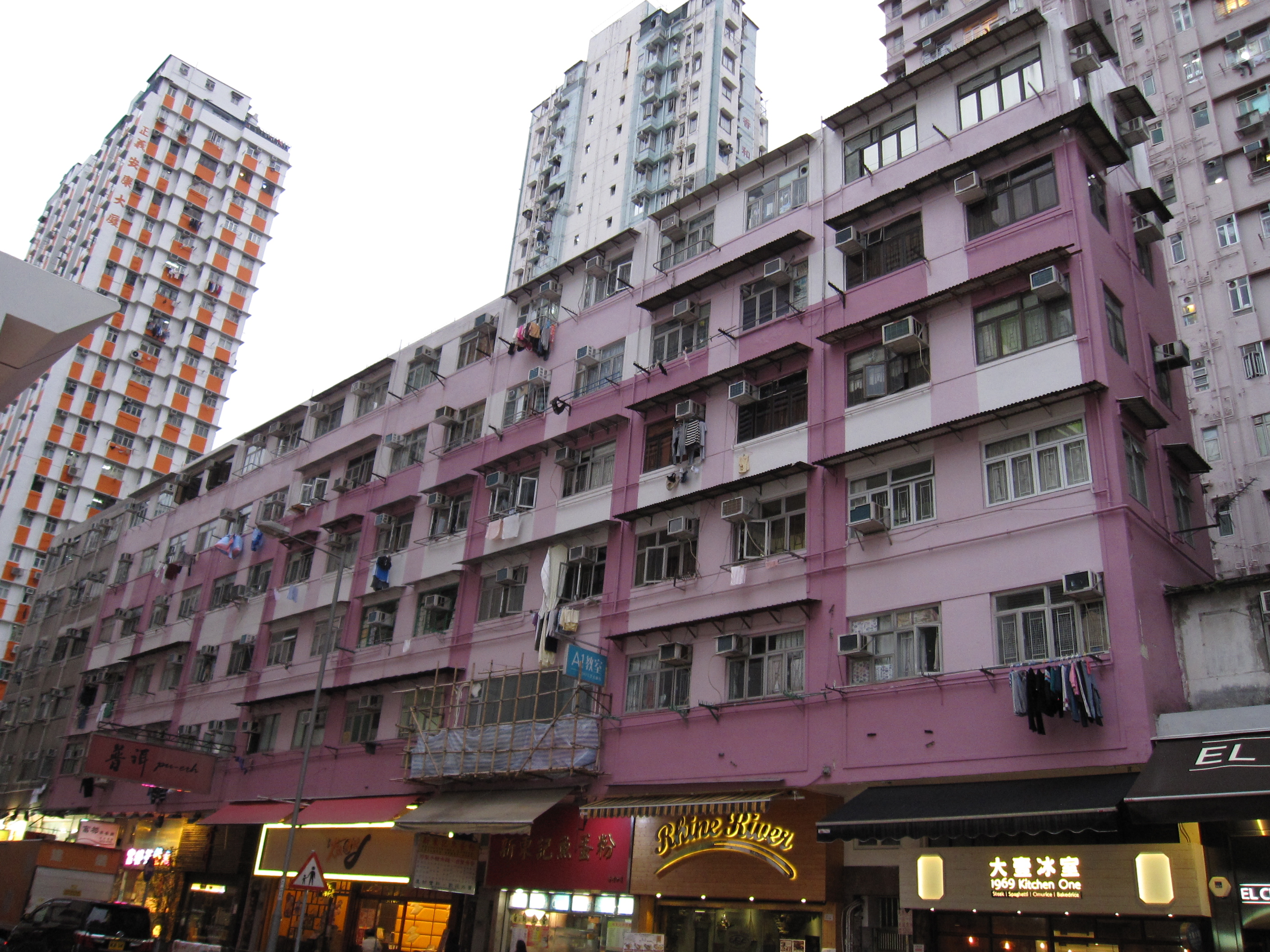 中文（香港）: 德仁樓第十六期。